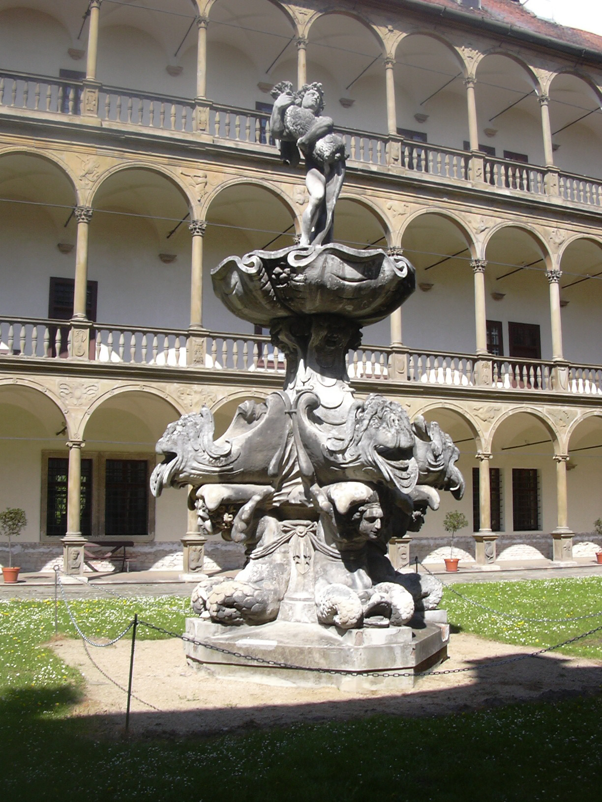 Státní zámek Bučovice